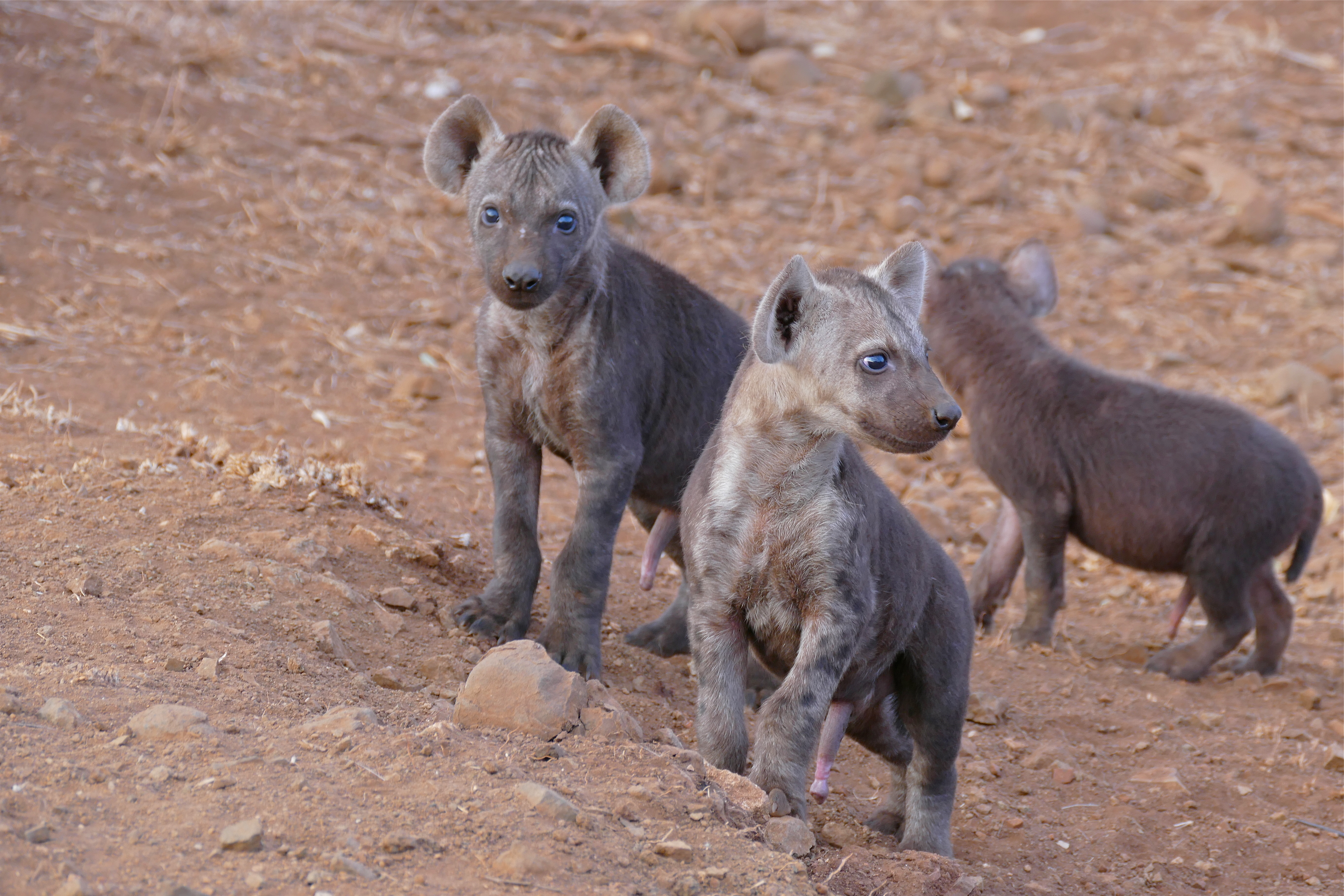 H6 Road East of Satara, Kruger NP, Mpumalanga, SOUTH AFRICA